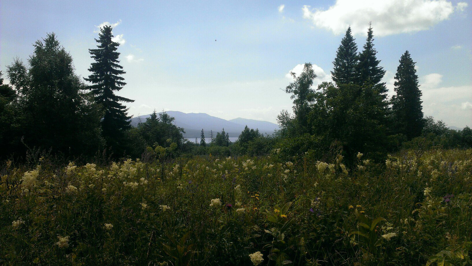 О. Зюраткуль. Вид на г. Лукаш, Саткинский район, Челябинская область